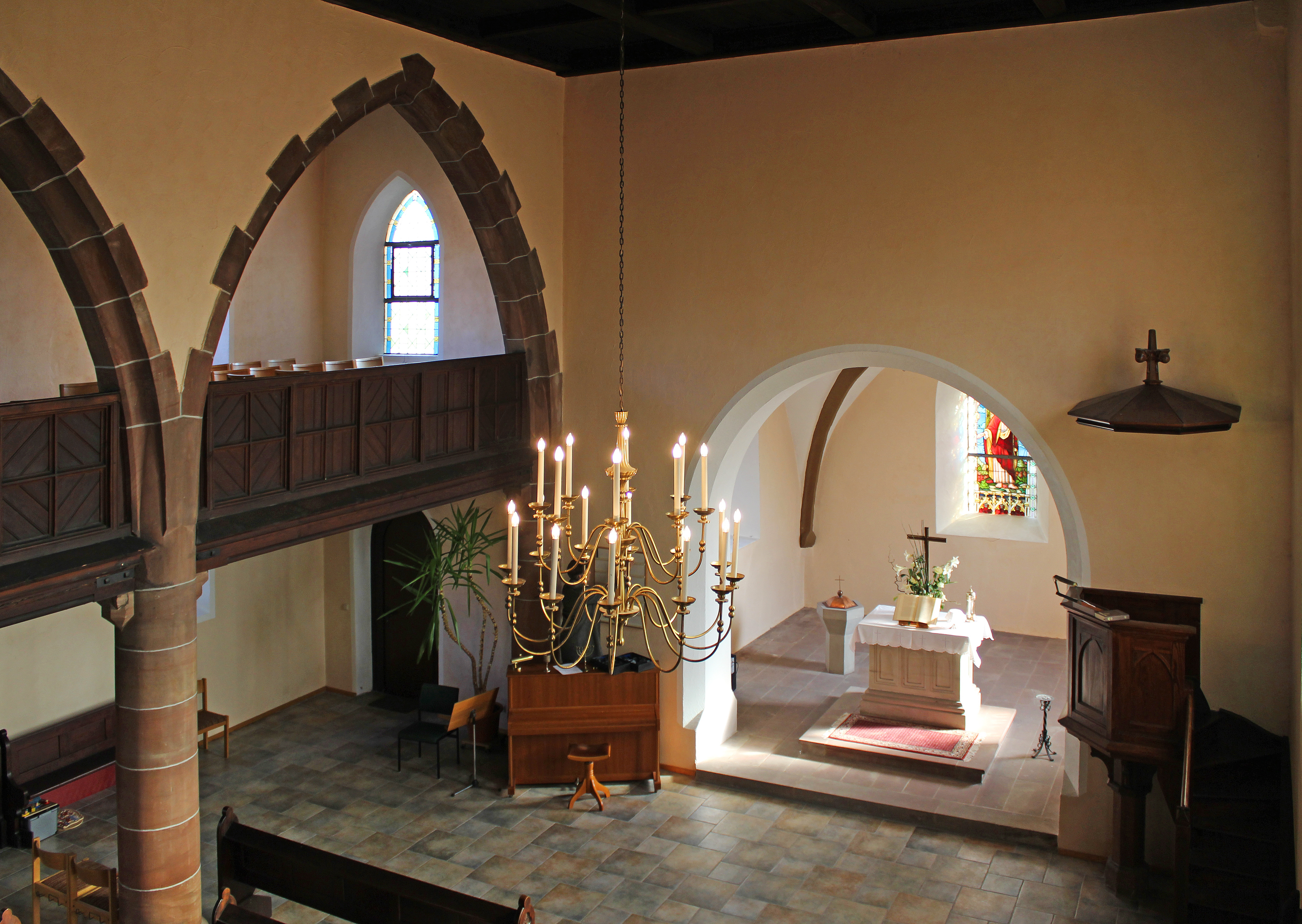 Blick ins Innere der evangelischen Jakobuskirche in Niederbexbach, einem Stadtteil von Bexbach, Saarpfalz-Kreis, Saarland